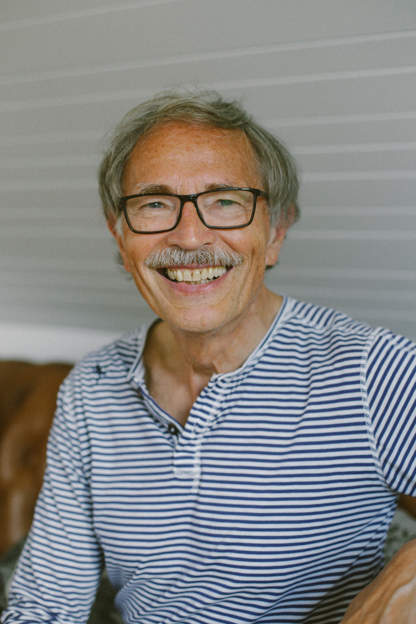 Abbildung von Bernd Fittkau